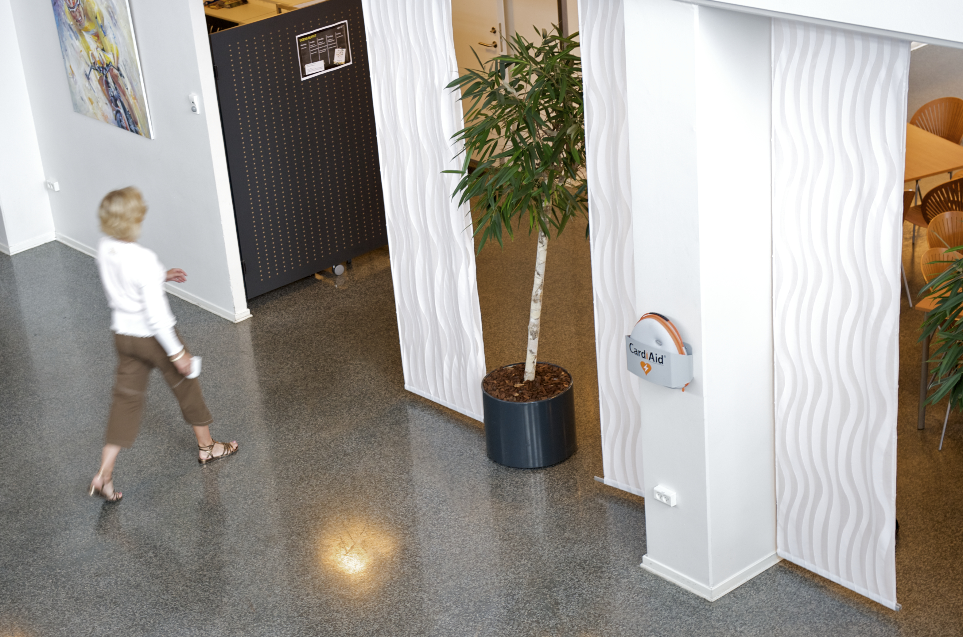 Defibrillateur automatique dans son support mural à Genève.